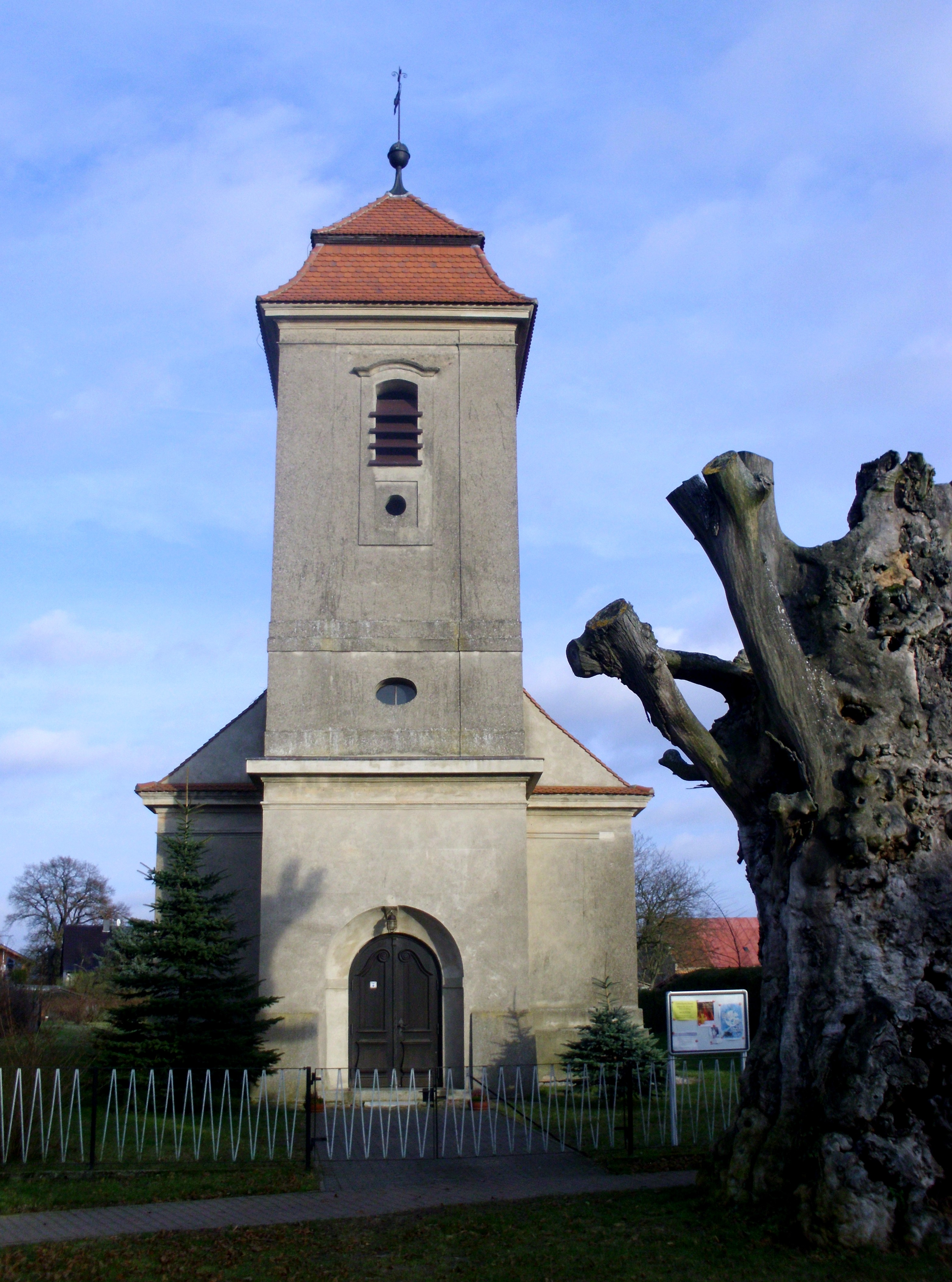 Dorfkirche Biesen, Ortsteil von Wittstock/Dosse, Brandenburg, Germany mit etwa 500 Jahre alter Bergulme, Umfang etwa 8 m